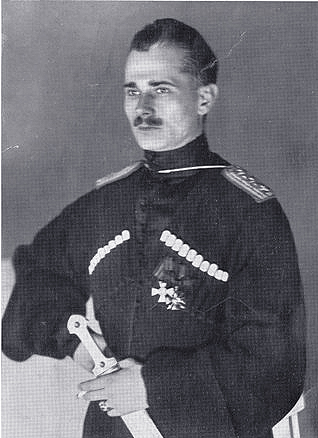 Іван Полтавець-Остряниця, наказний отаман Вільного козацтва